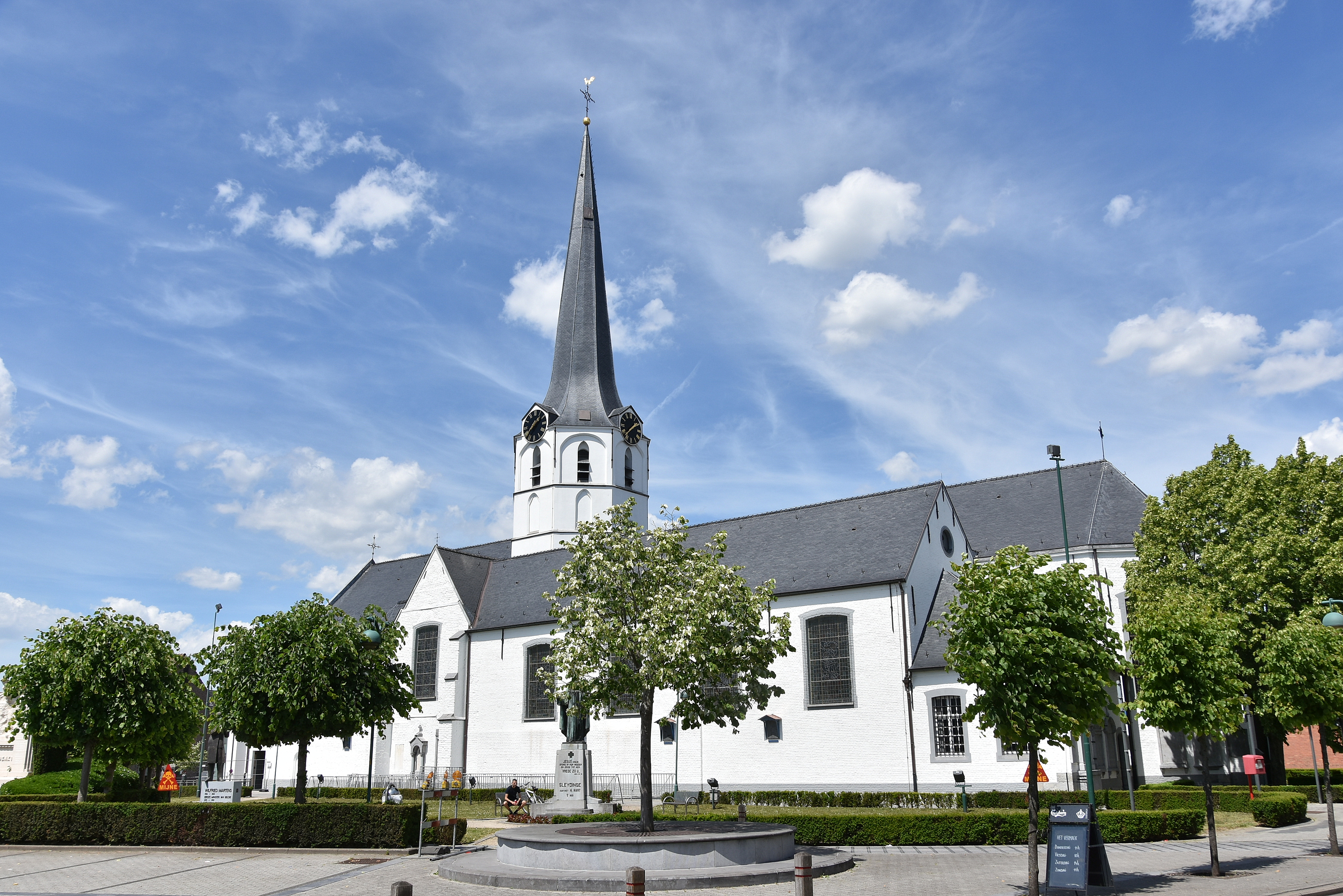 Sint-Joriskerk (Sleidinge) (34407) 2-06-2019 13-38-37